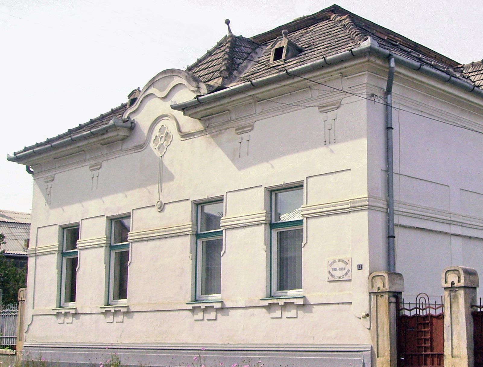 Turda, clădire în stil Secession (str. George Coşbuc nr.12), parohia Bisericii Unitariene.